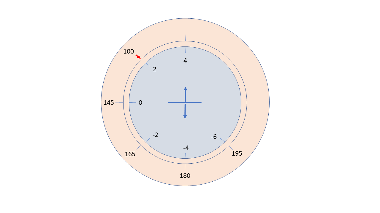 MacCready Ring für Sollfahrt